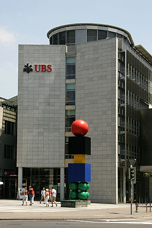 UBS in Zug